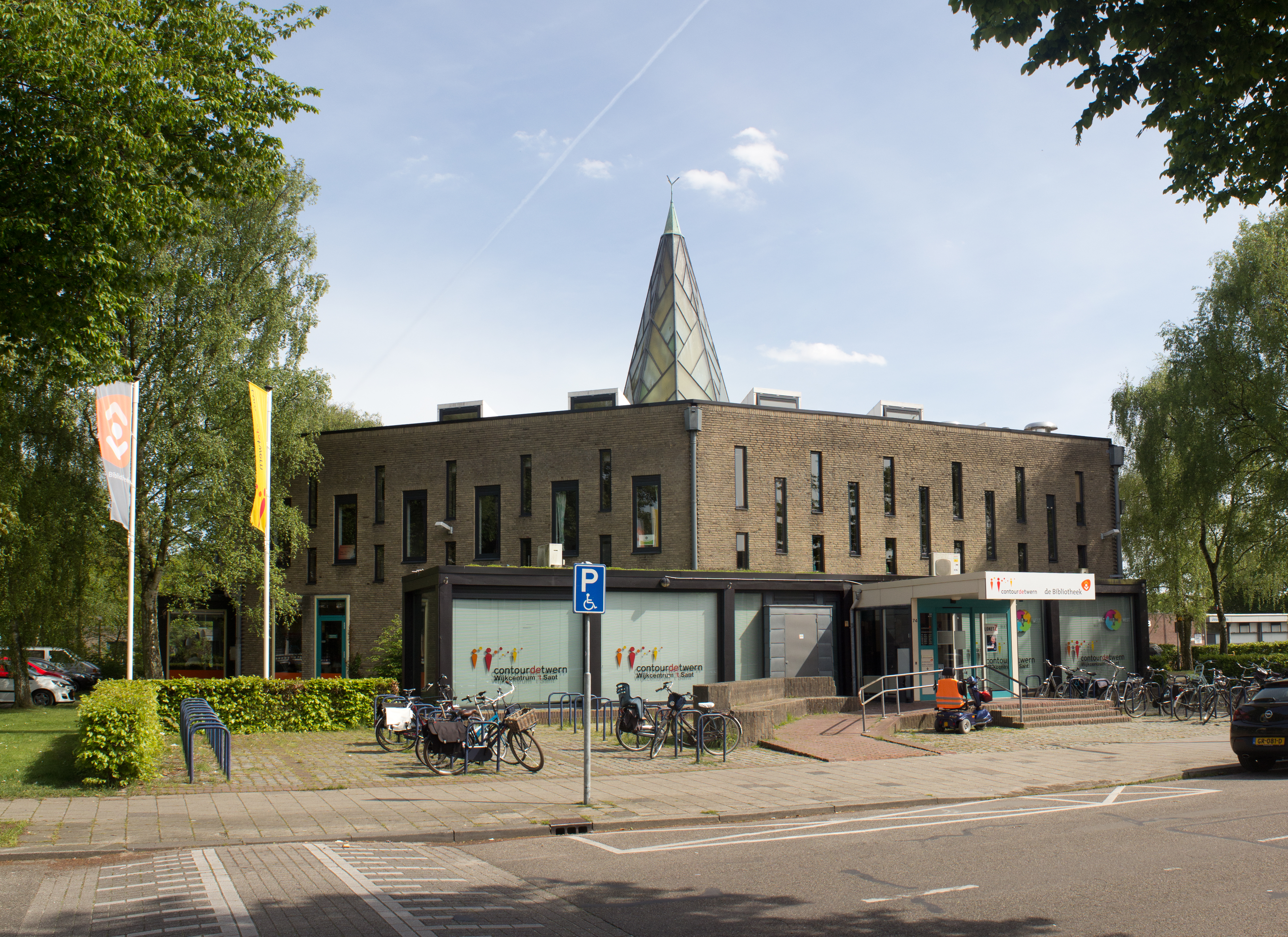 De Pastoor van Arskerk te Tilburg. Nu wijkcentrum 't Zand.